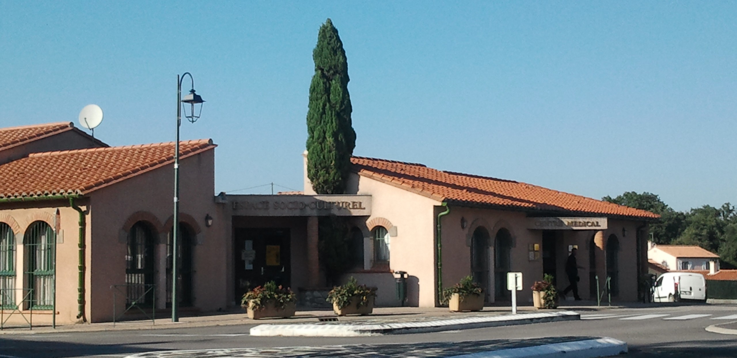 Espace socio culturel et centre médical à Saint-Jean-Pla-de-Corts